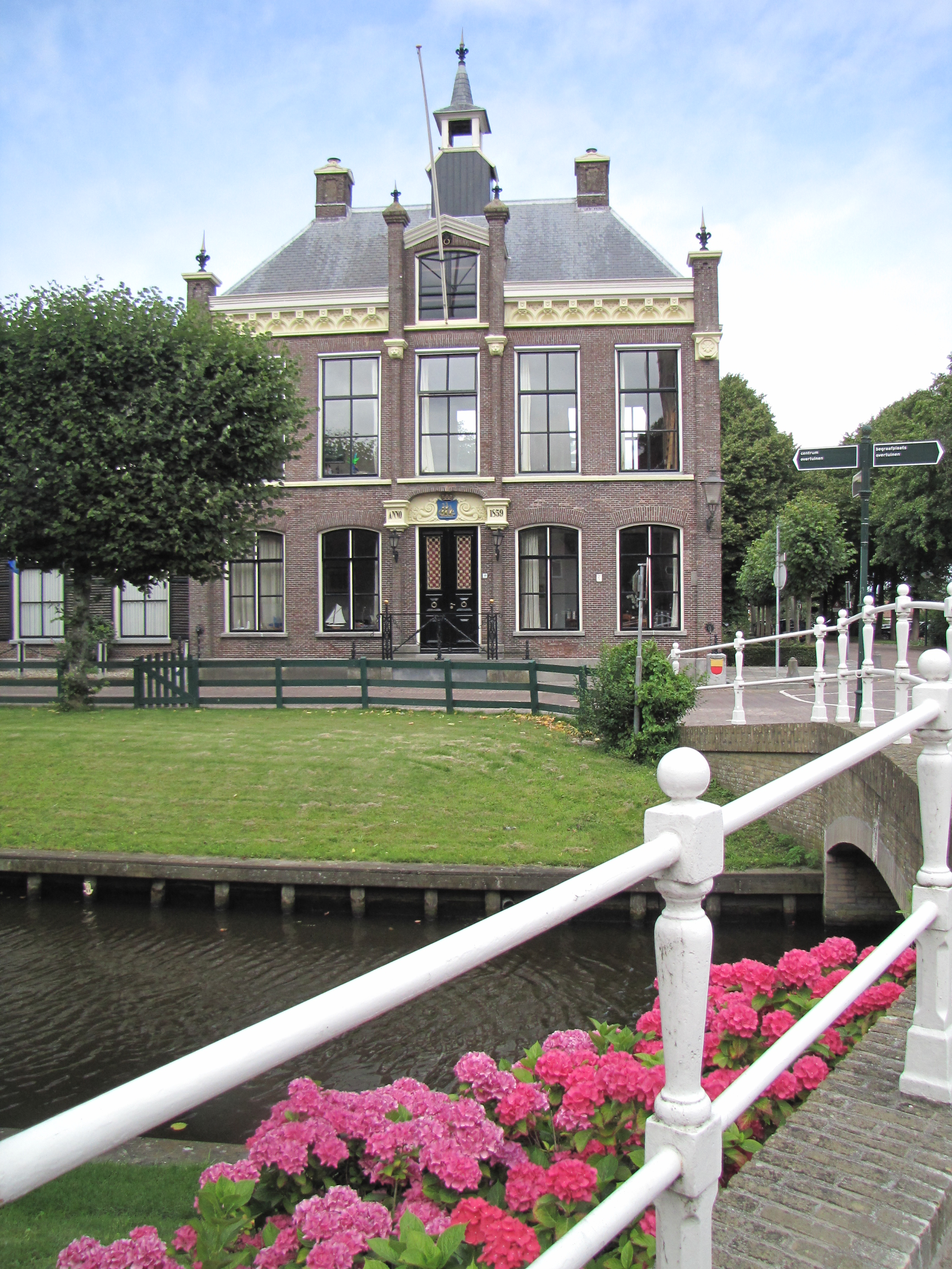 Oude stadhuis (IJlst)